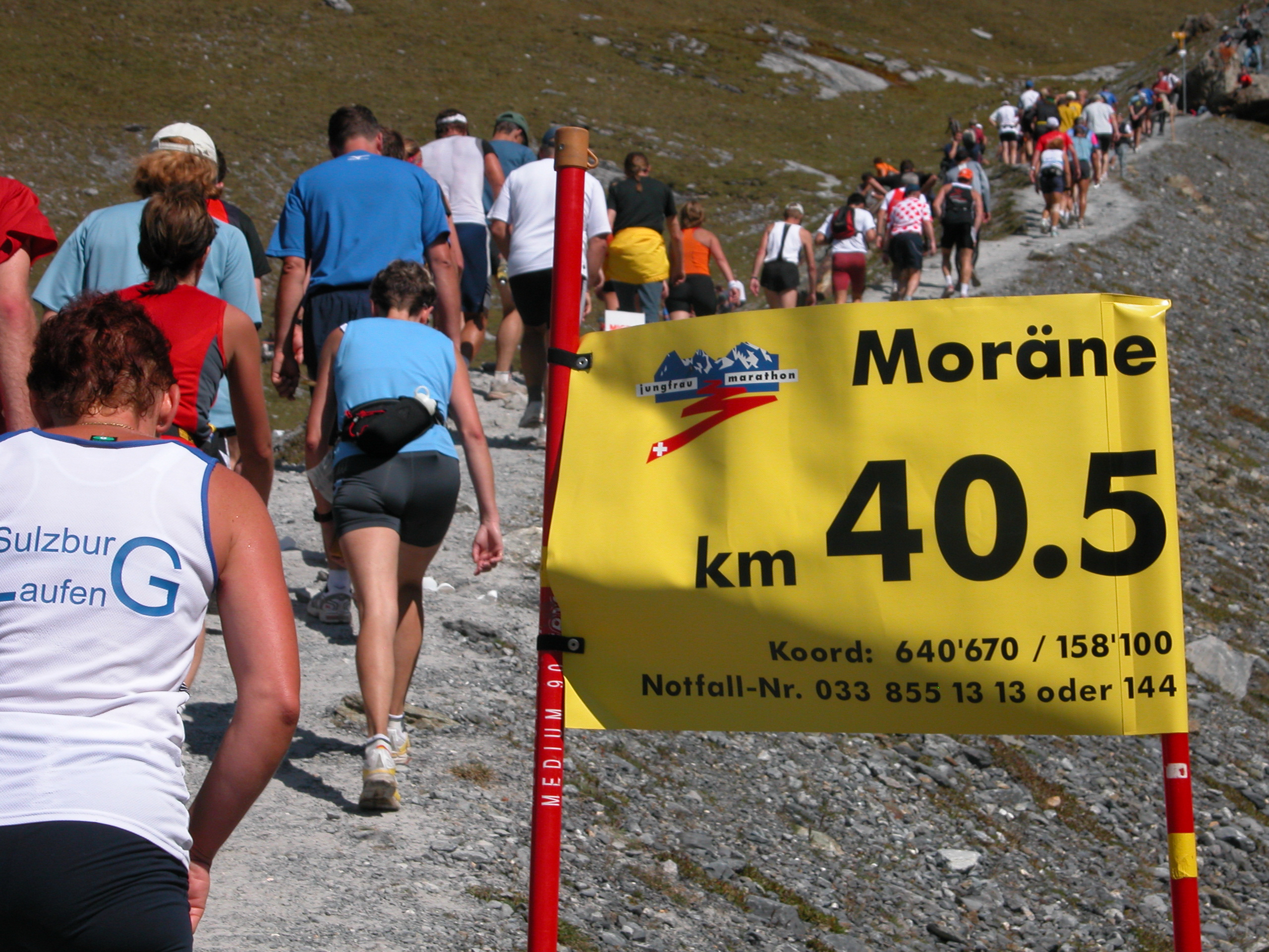 14. Jungfrau-Marathon am 09.09.2006